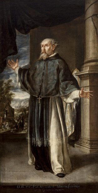 La obra representa a Fray Hernando de Talavera (1428-1507), que fue prior del monasterio de Nuestra Señora del Prado en Valladolid, obispo de Ávila, arzobispo de Granada y confesor y consejero de la reina Isabel la Católica.